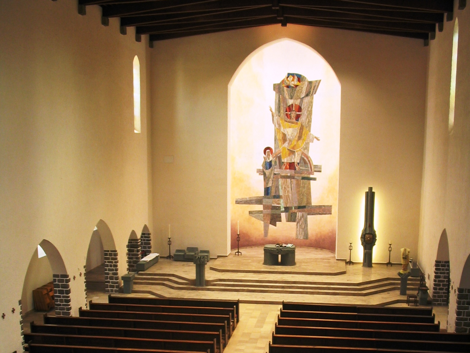 Liebfrauenkirche Darmstadt innen